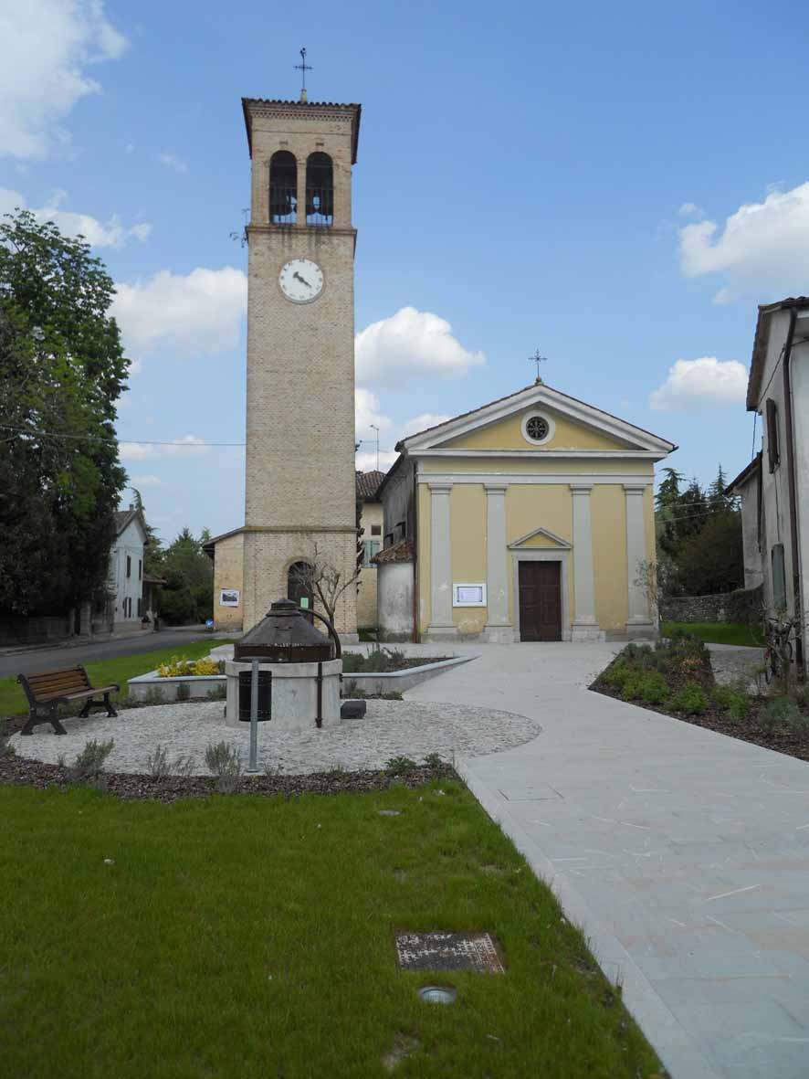 La chiesa di Ronchiettis, fraz. di Santa Maria la Longa